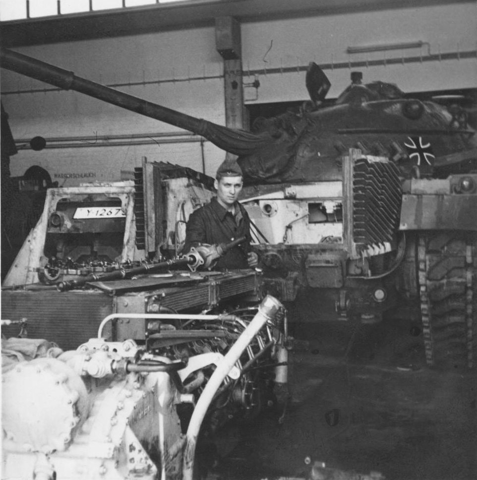 M48 Motor und Getriebe bei der Instandsetzung. Nockenwellenlagerung wurde neu abgedichtet.(Erhaltungsstufe IV 1968)